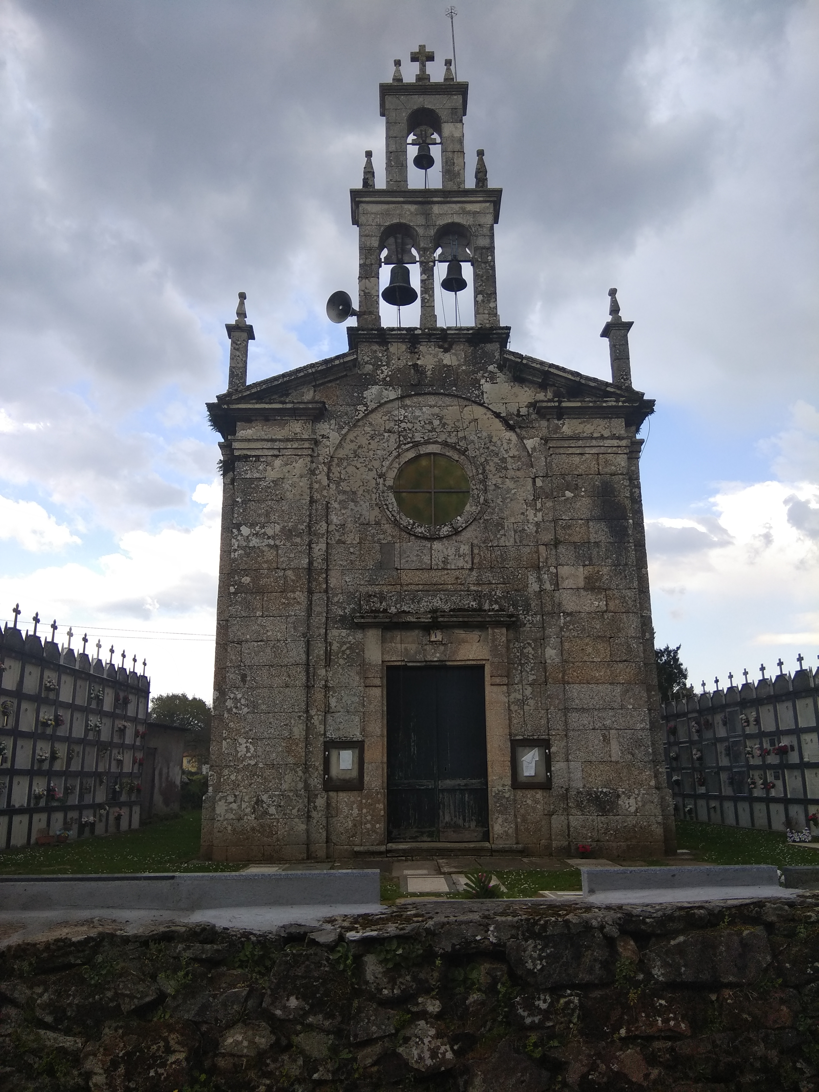 Igrexa de Vilariño (Vilasantar, Galiza).